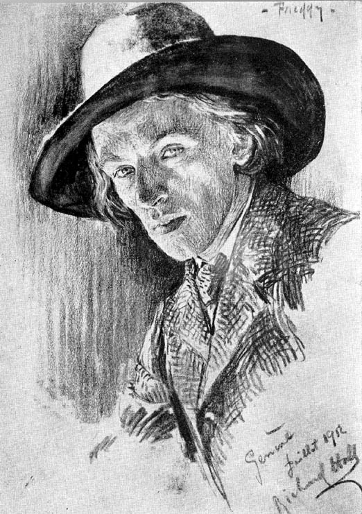 Portrait de Cendrars à Genève